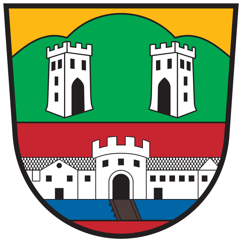 Wappen von Oberdrauburg